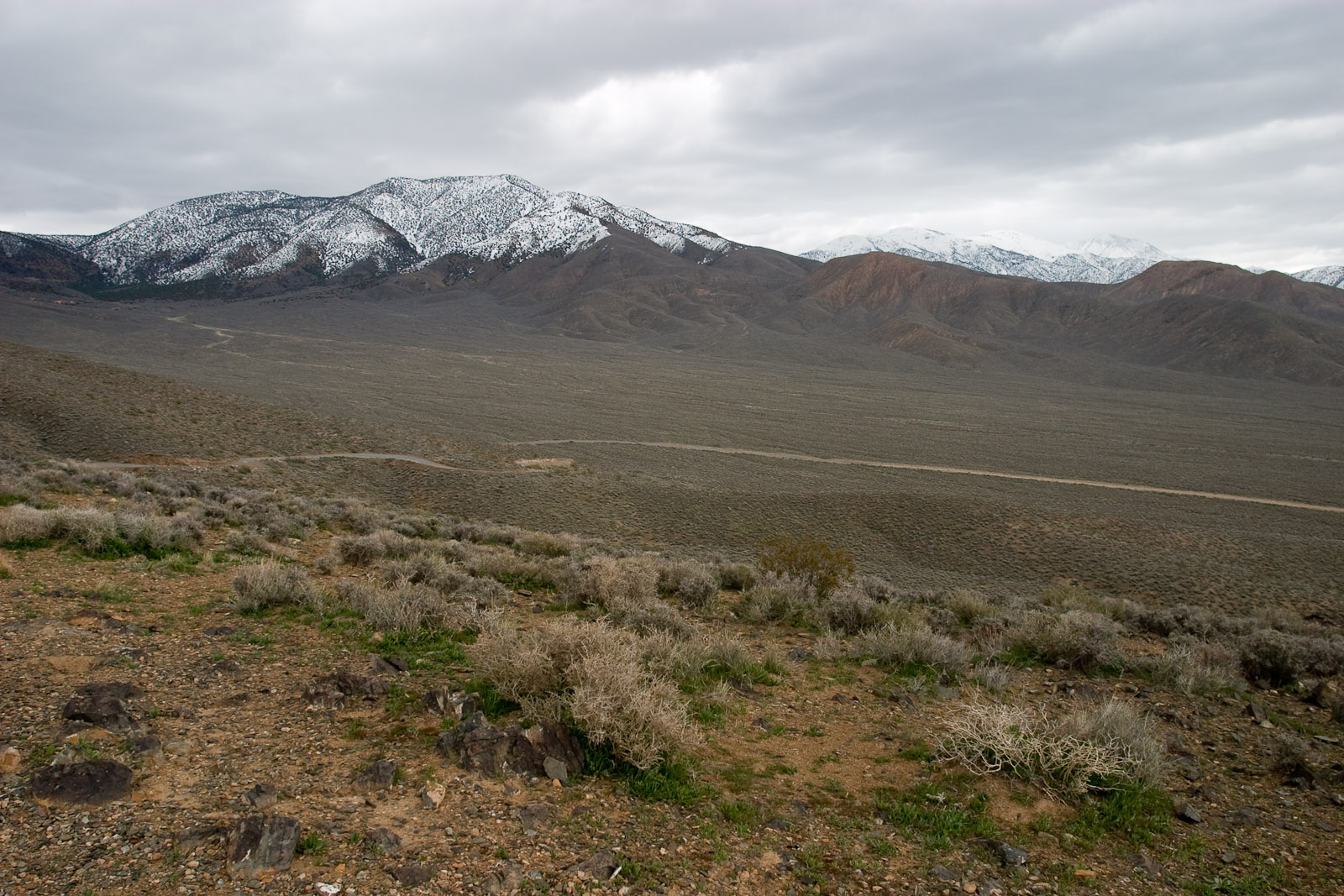 Wildrose Peak